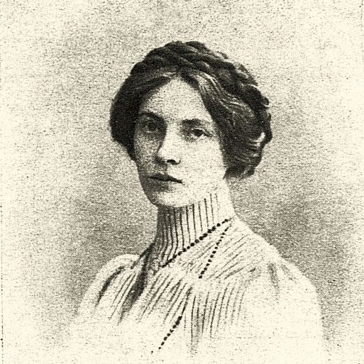 Marija Alekseevna Prokof'eva